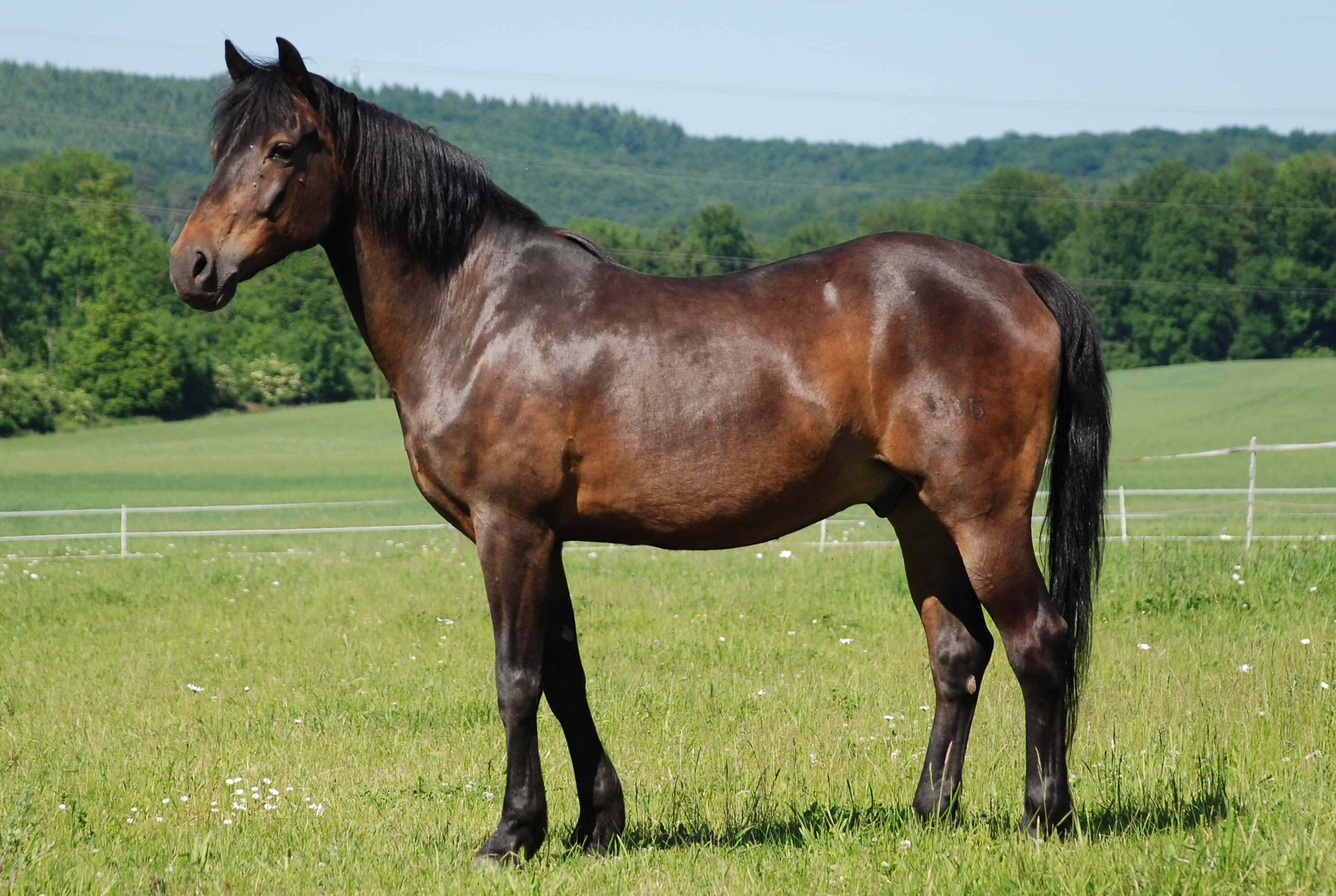 Deutsches Reitpony, wallach, im Stand